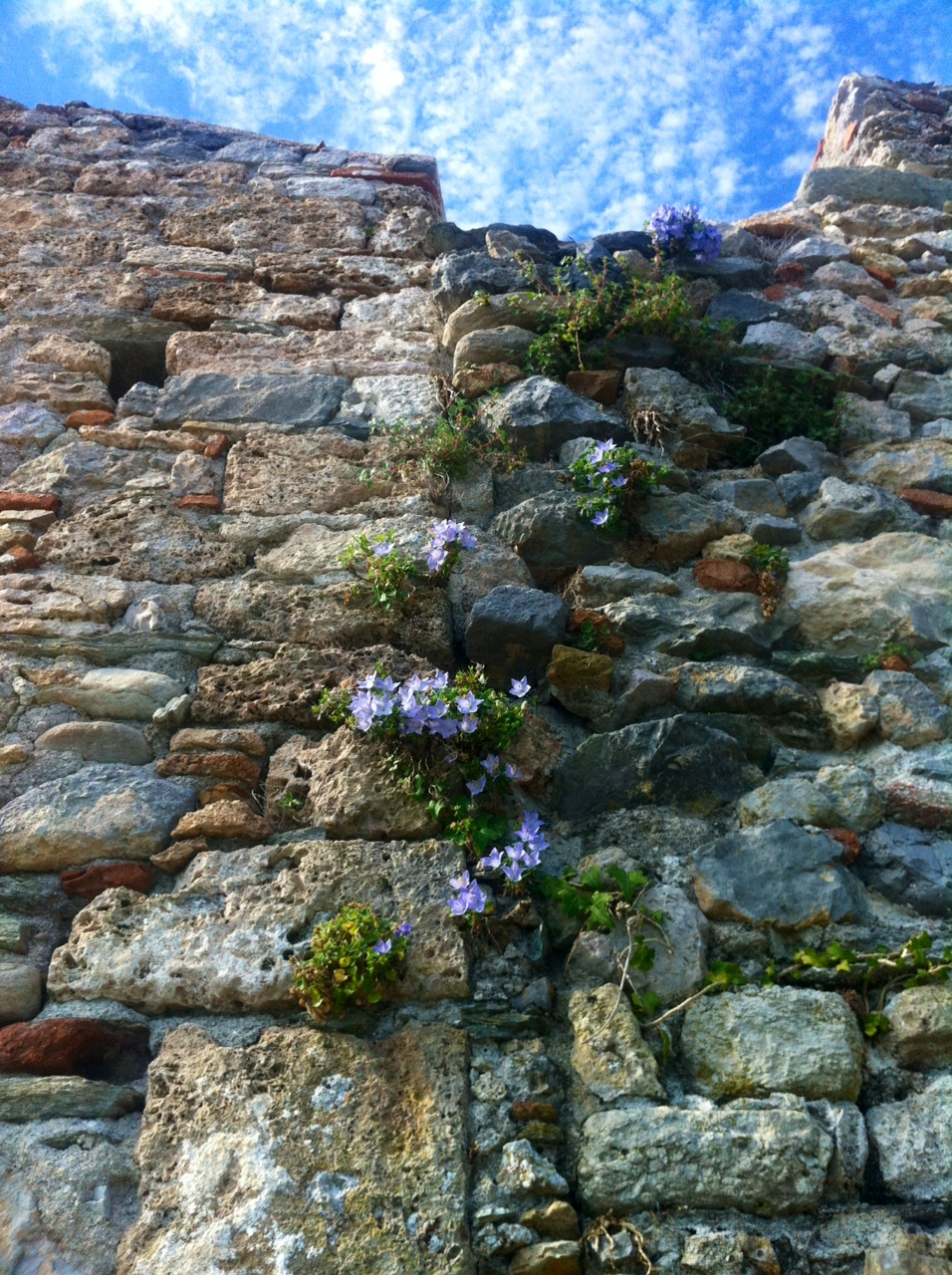 Chiesa Medioevale di San Lorenzo This is a photo of a monument which is part of cultural heritage of Italy.